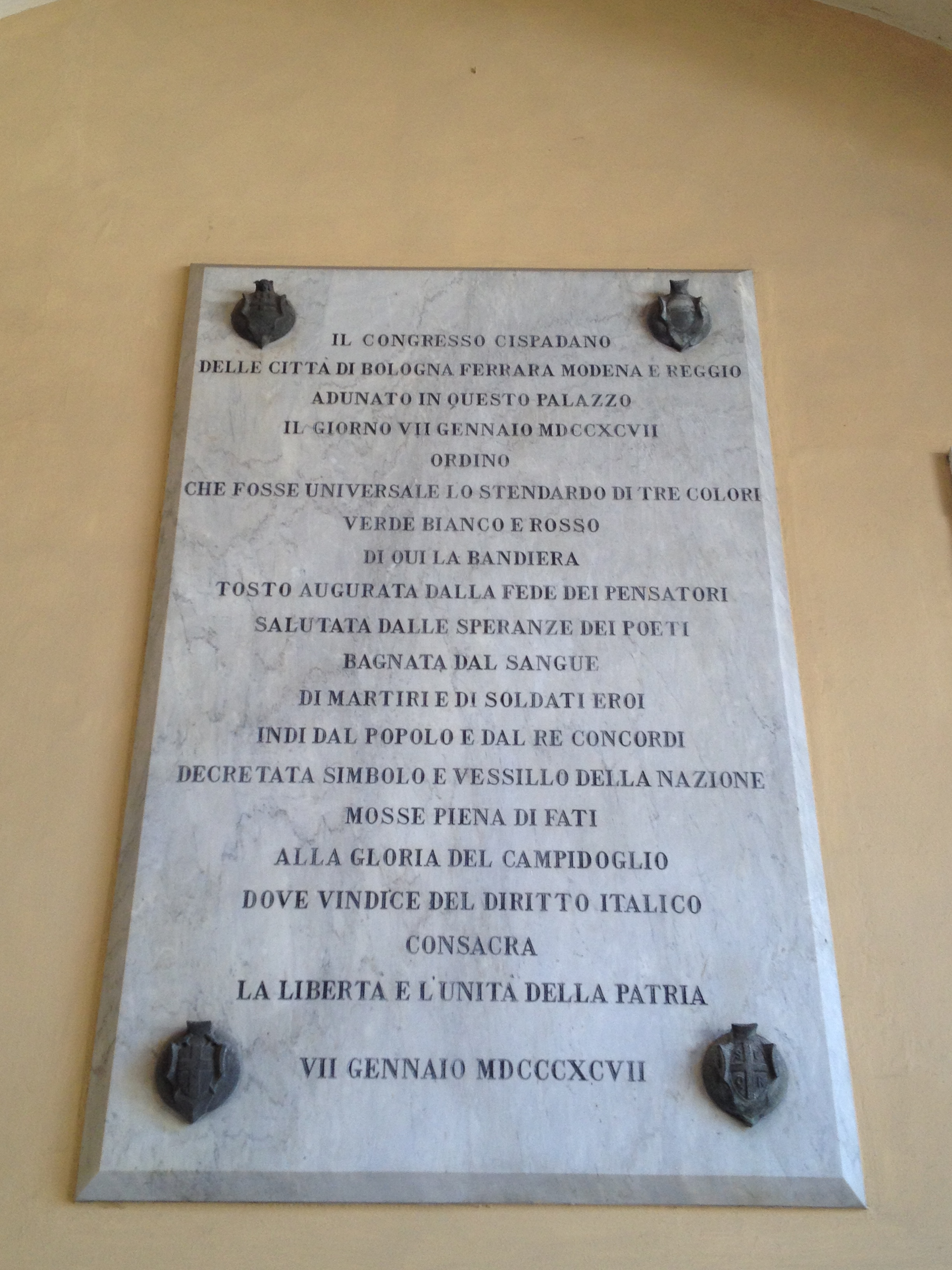 Lapide commemorativa del congresso della Repubblica Cispadana posta nell'androne del palazzo comunale di Reggio nell'Emilia.